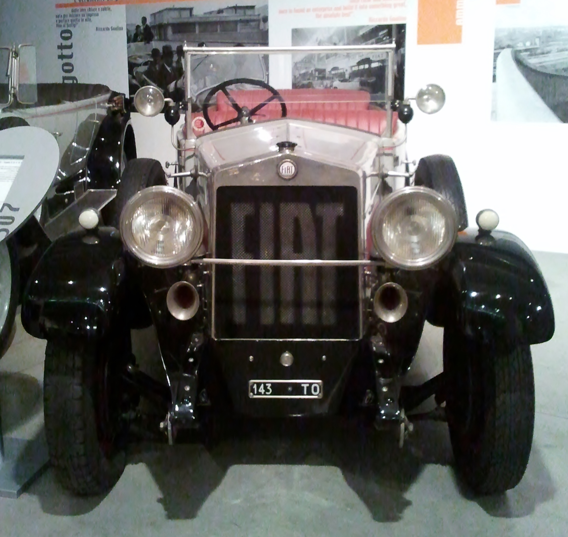 Fiat 507 Torpedo en el Centro Storico Fiat